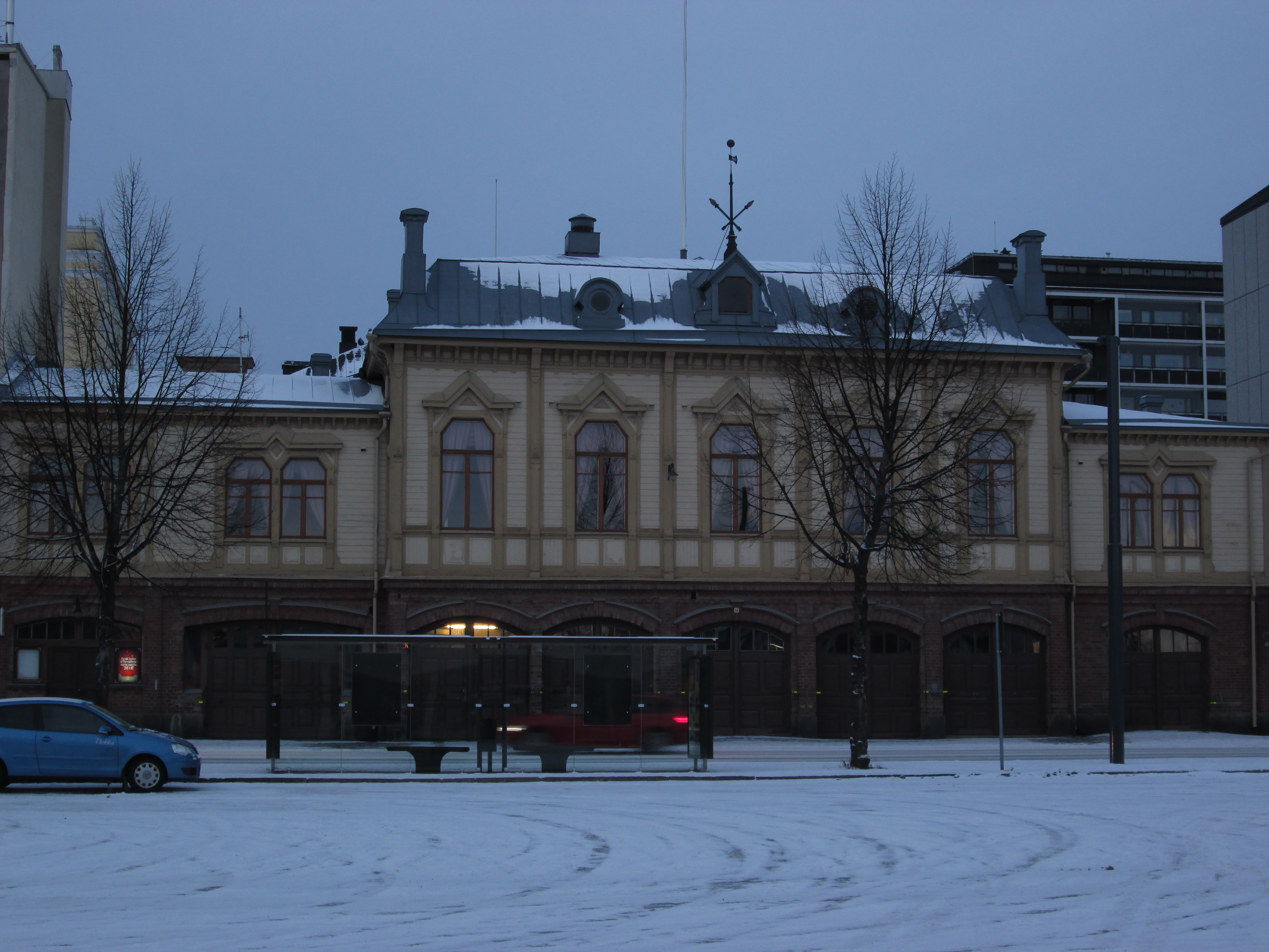 Hämeenlinnan palokunnantalo